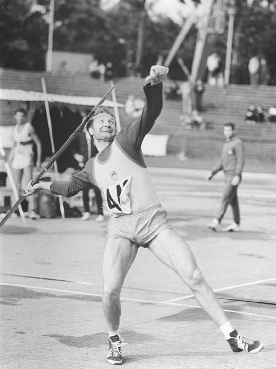 Manfred Stolle Zentralbild Demme 05.07.1970 Erfurt: XXI.DDR-Leichtathletik-Meisterschaften vom 03.-05.07.1970 - 2.Tag-Als sechster Speerwerfer der Welt übertraf Manfred Stolle im fünften Versuch mit Glänzenden 90,64 Meter die begehrte 90-Meter-Marke. Der Potsdamer ASK-Sportler verbesserte seinen eigenen Rekord gleich um 4,78 Meter und stellte mit dieser Weite eine neue Jahres-Weltbestleistung auf.